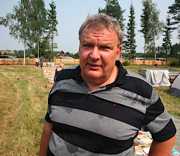 Margus Leivo setu kuningriigi päeval